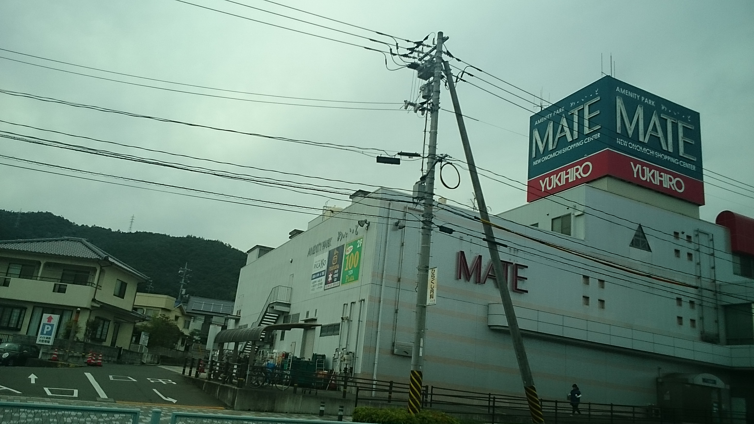 メイト栗原店の写真です。